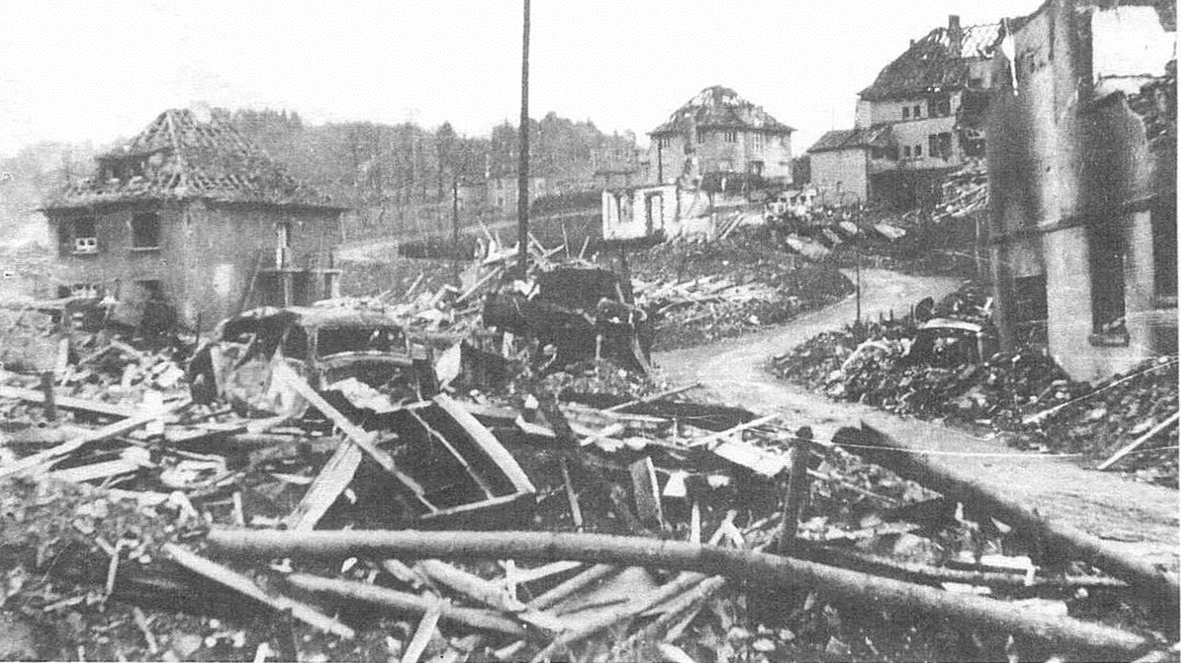 Zerstörte Hauptstraße in Engelskirchen nach Luftangriffen 1945